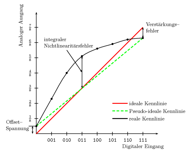 Kennlinie Digital-Analog-Umsetzer